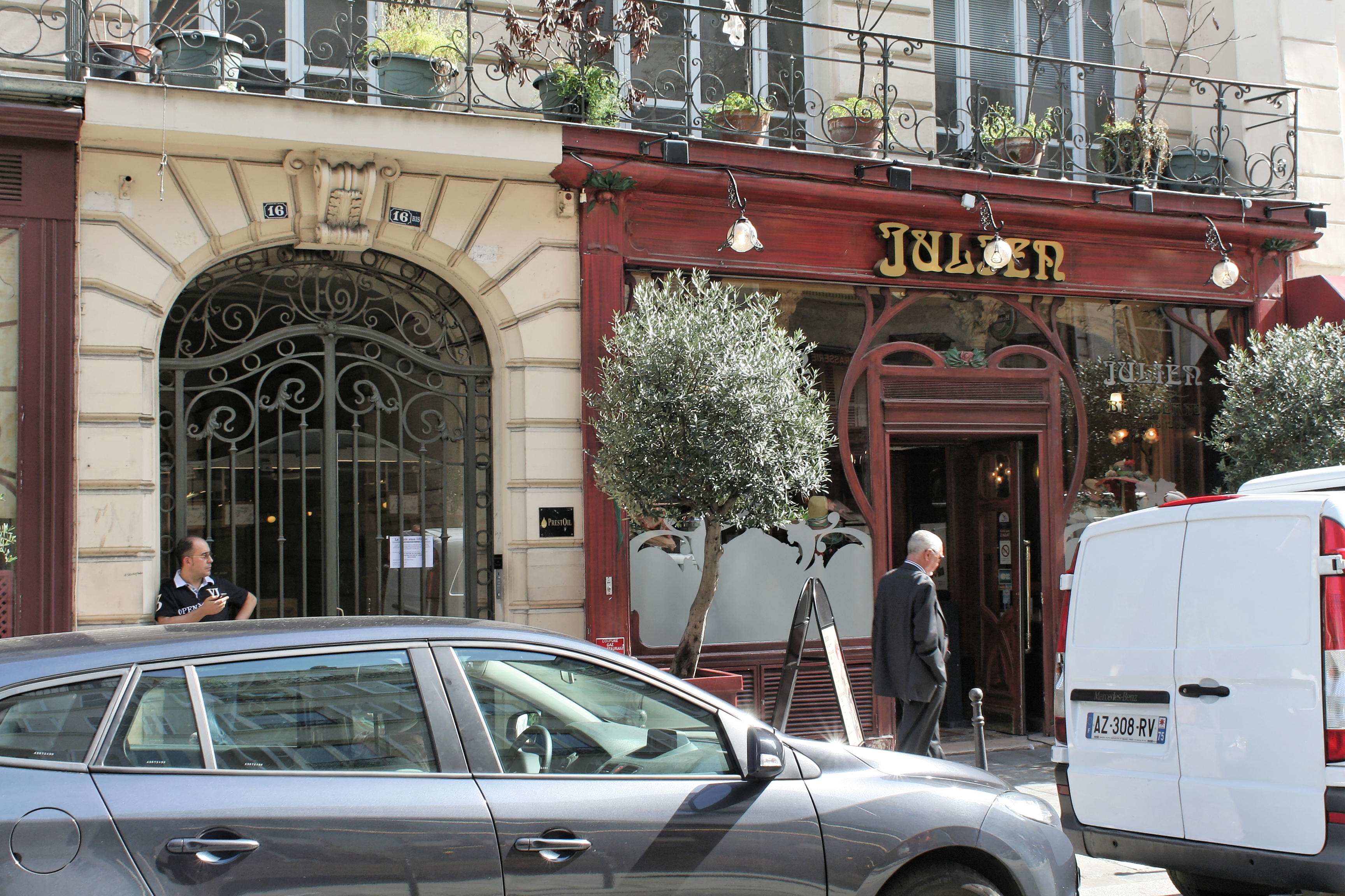 Brasserie Julien, 16bis rue du Faubourg Saint-Denis (Paris).